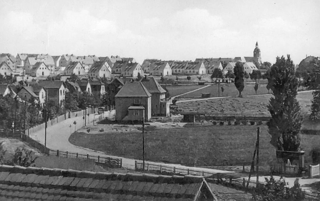 Die 1940 fertiggestellte Bergarbeitersiedlung in Magdeborn